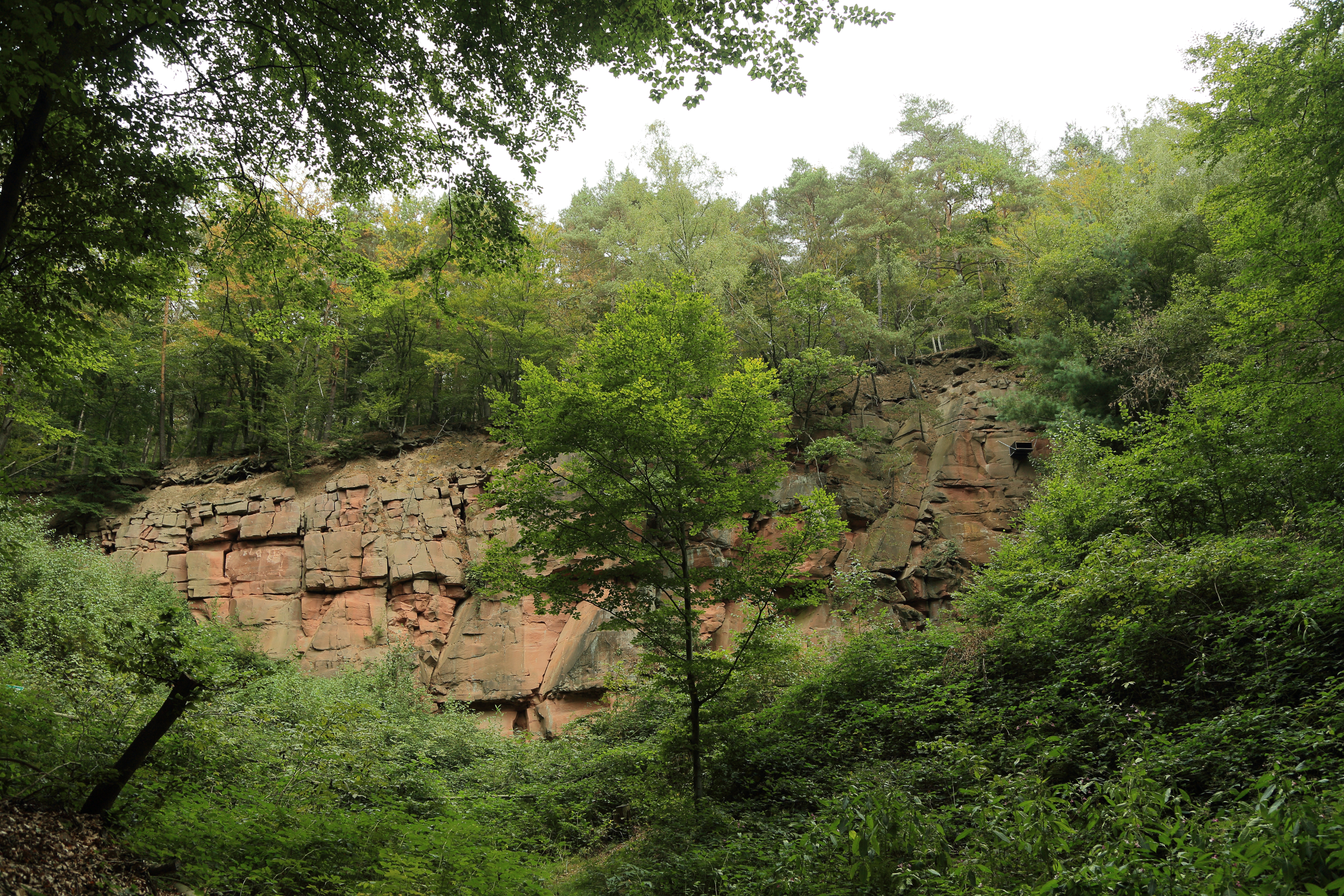 Sandsteinbruch NE von Röderhof Geotop-Nummer: 671A009, Buntsandstein